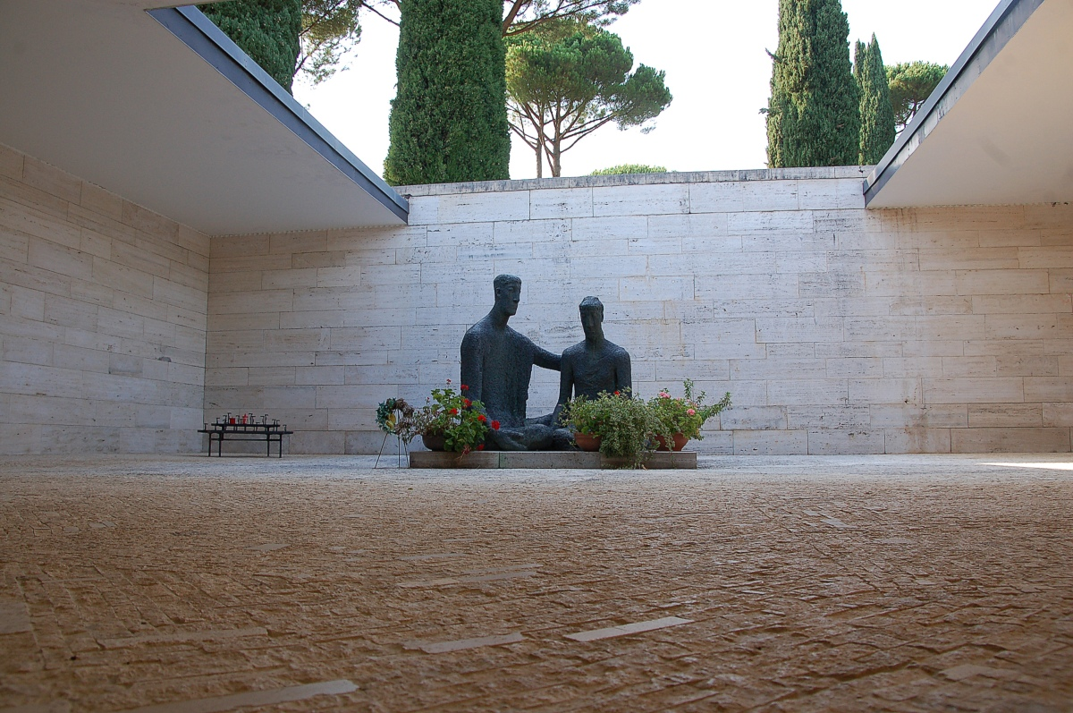 Der deutsche Soldatenfriedhof Cassino